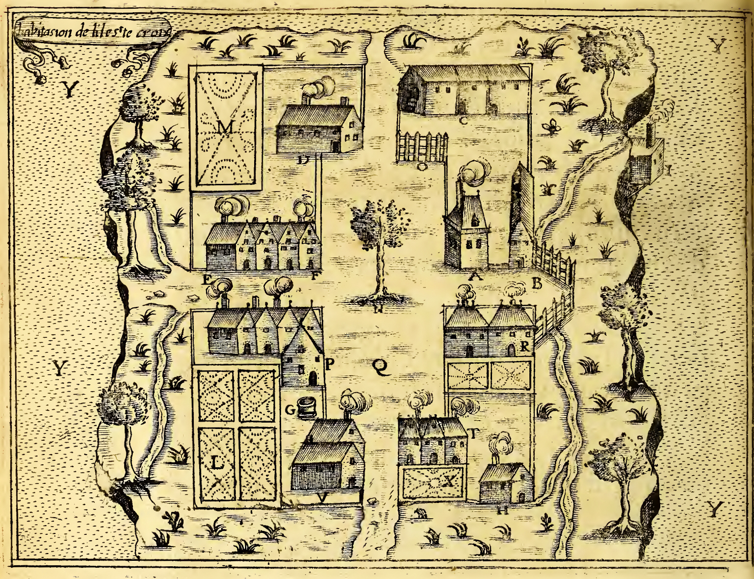 Plan de l'habitation de l'île Sainte-Croix, premier site de colonisation en Nouvelle-France.